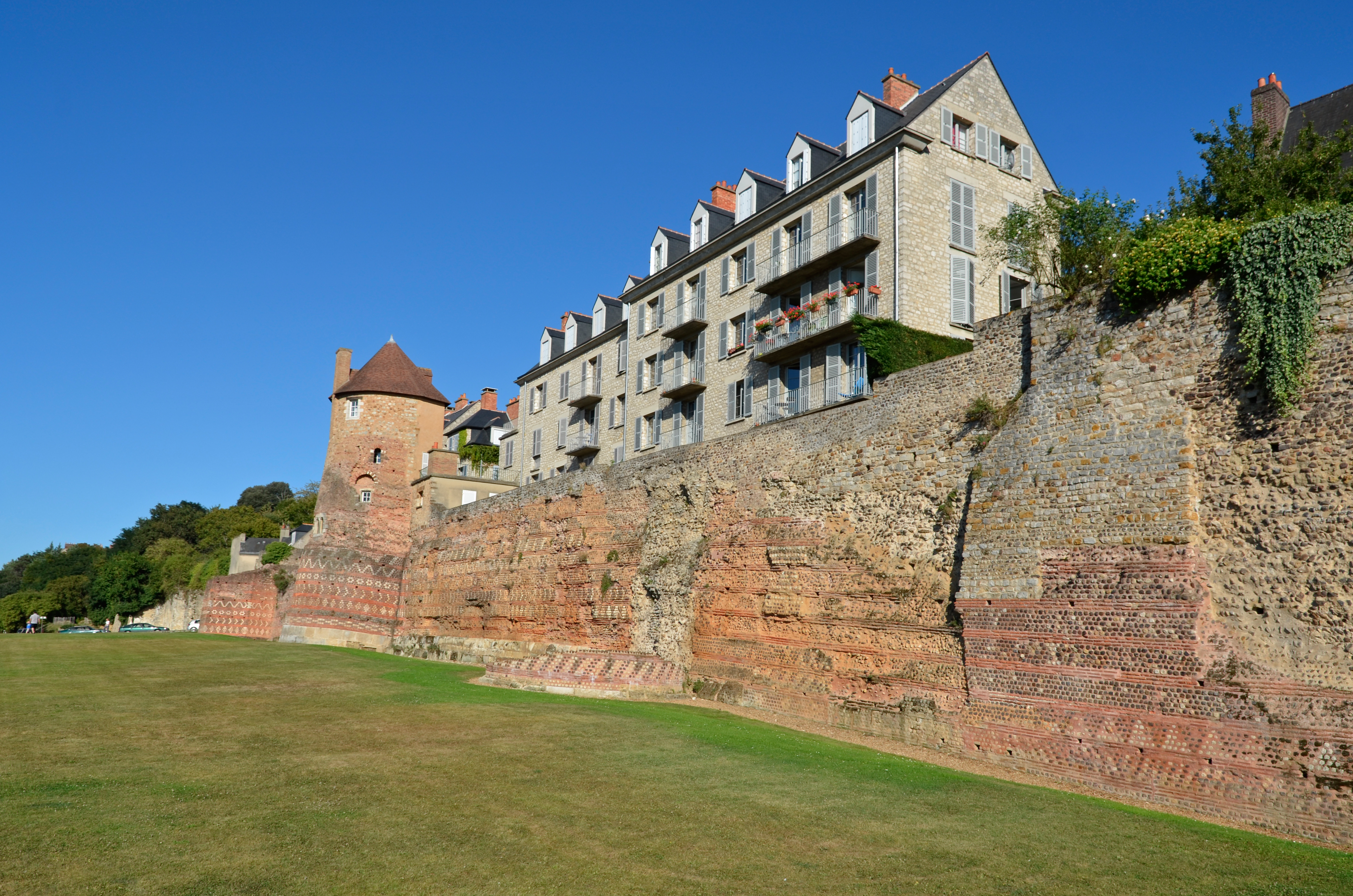 Vestiges de l'enceinte romaine - Le Mans, Sarthe .